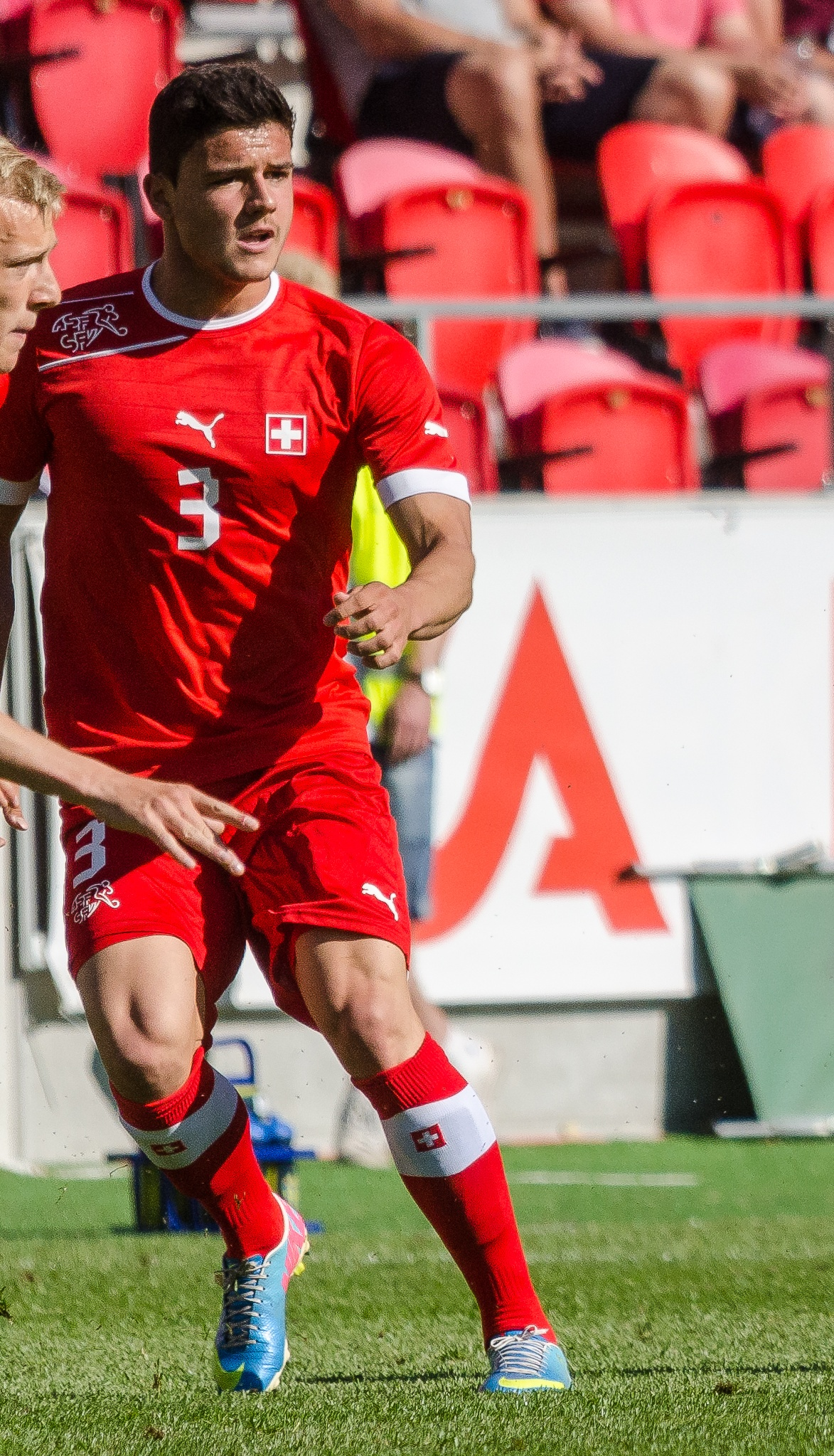 Swiss footballer Loris Benito in the Swiss Under-21 national team's 3-2 defeat to Sweden at Myresjöhus Arena in Växjö, June 6 2013.